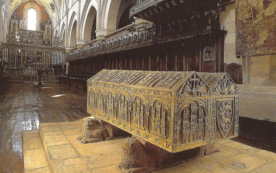 Sepulcro del rey Alfonso VIII de Castilla (1155-1214) y de su esposa, la reina Leonor de Plantagenet (1160-1214).